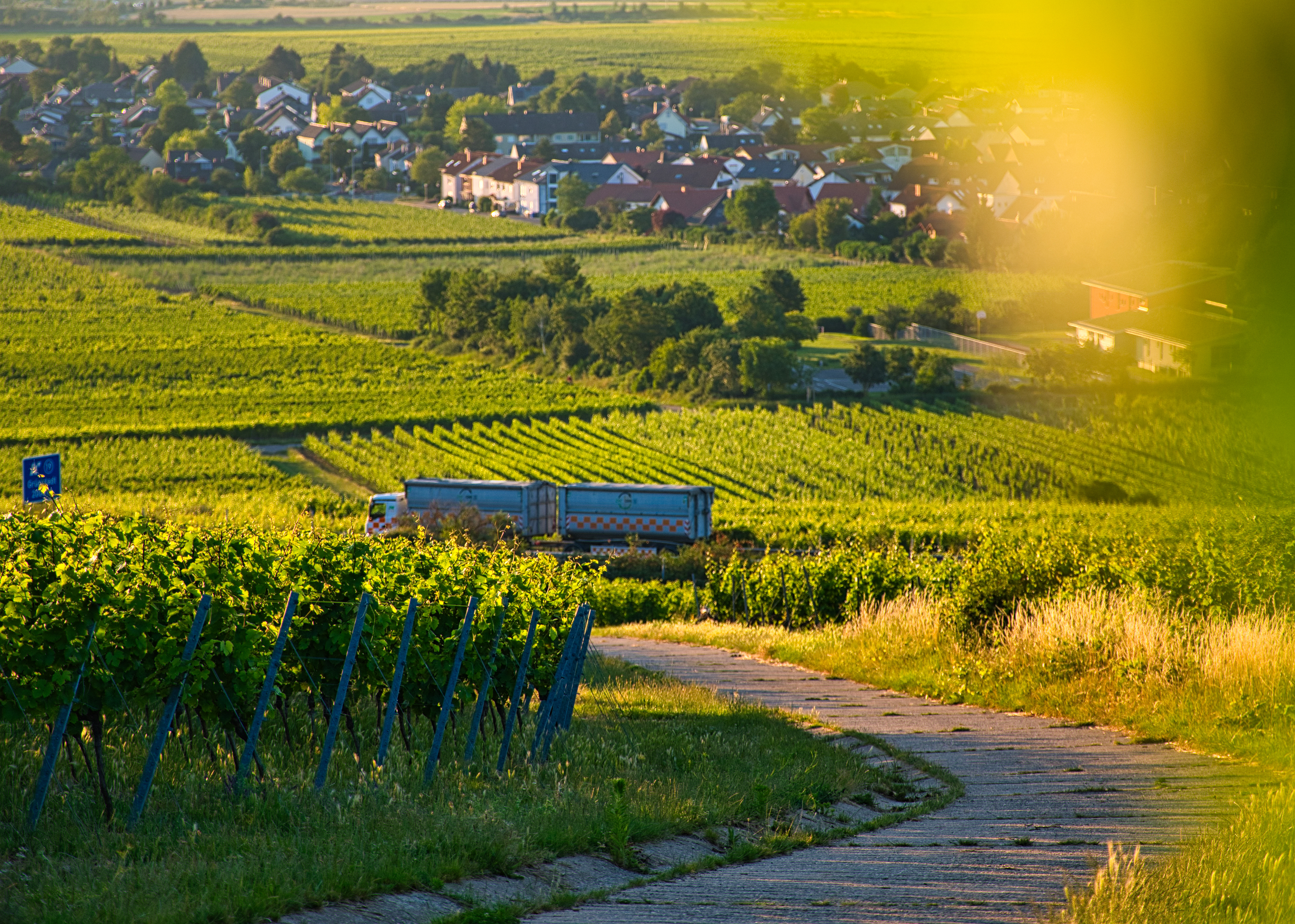 Unmittelbar neben diesem Weinberg im Biosphärenreservat Pfälzerwald bei Grünstadt verläuft die A6, auf der tagtäglich viel los ist.